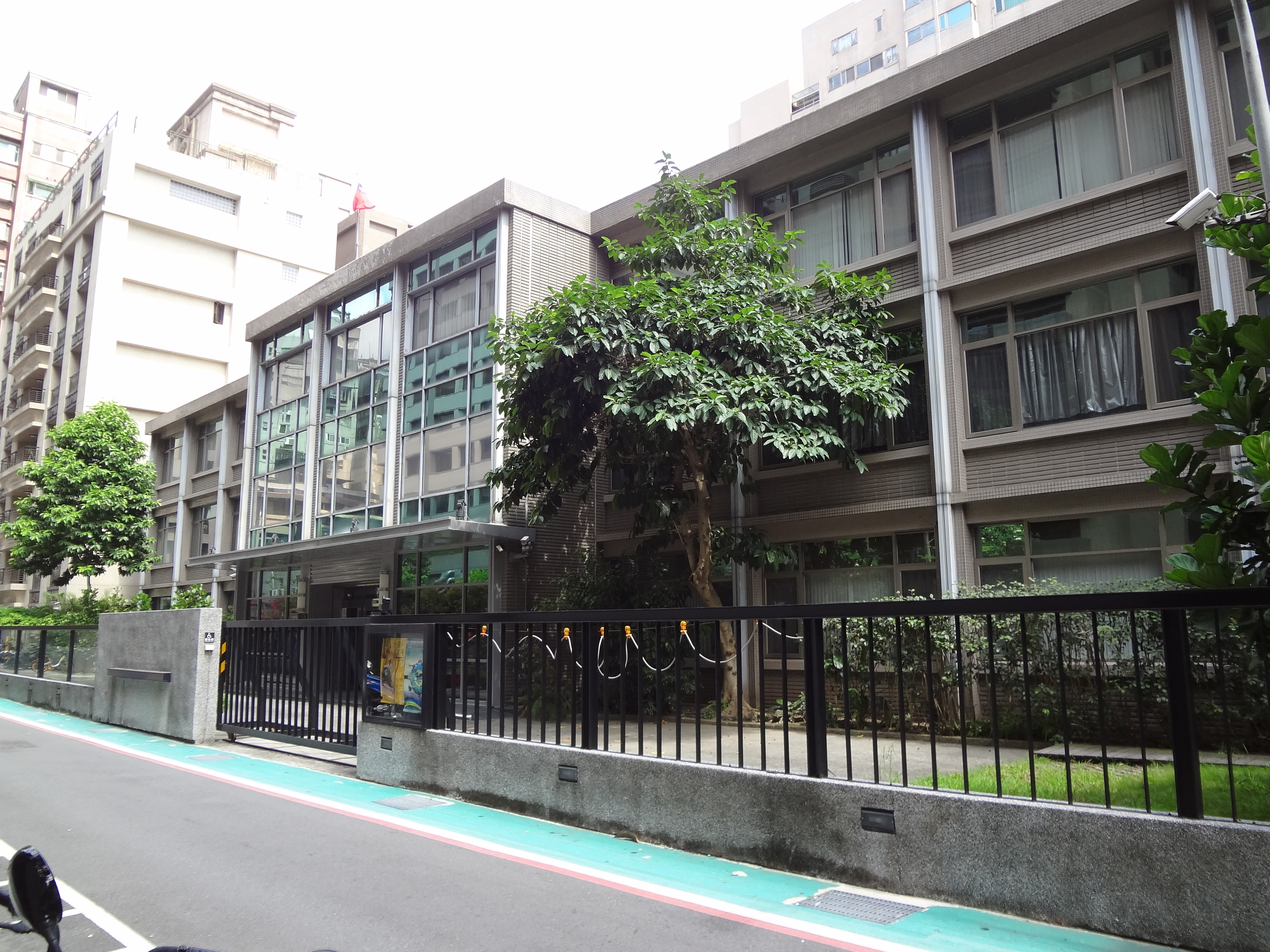 中華民國國家發展委員會檔案管理局電子文書檔案服務中心，原行政院研究發展考核委員會檔案管理局伊通街辦公室，地址：臺北市中山區伊通街59巷10號。